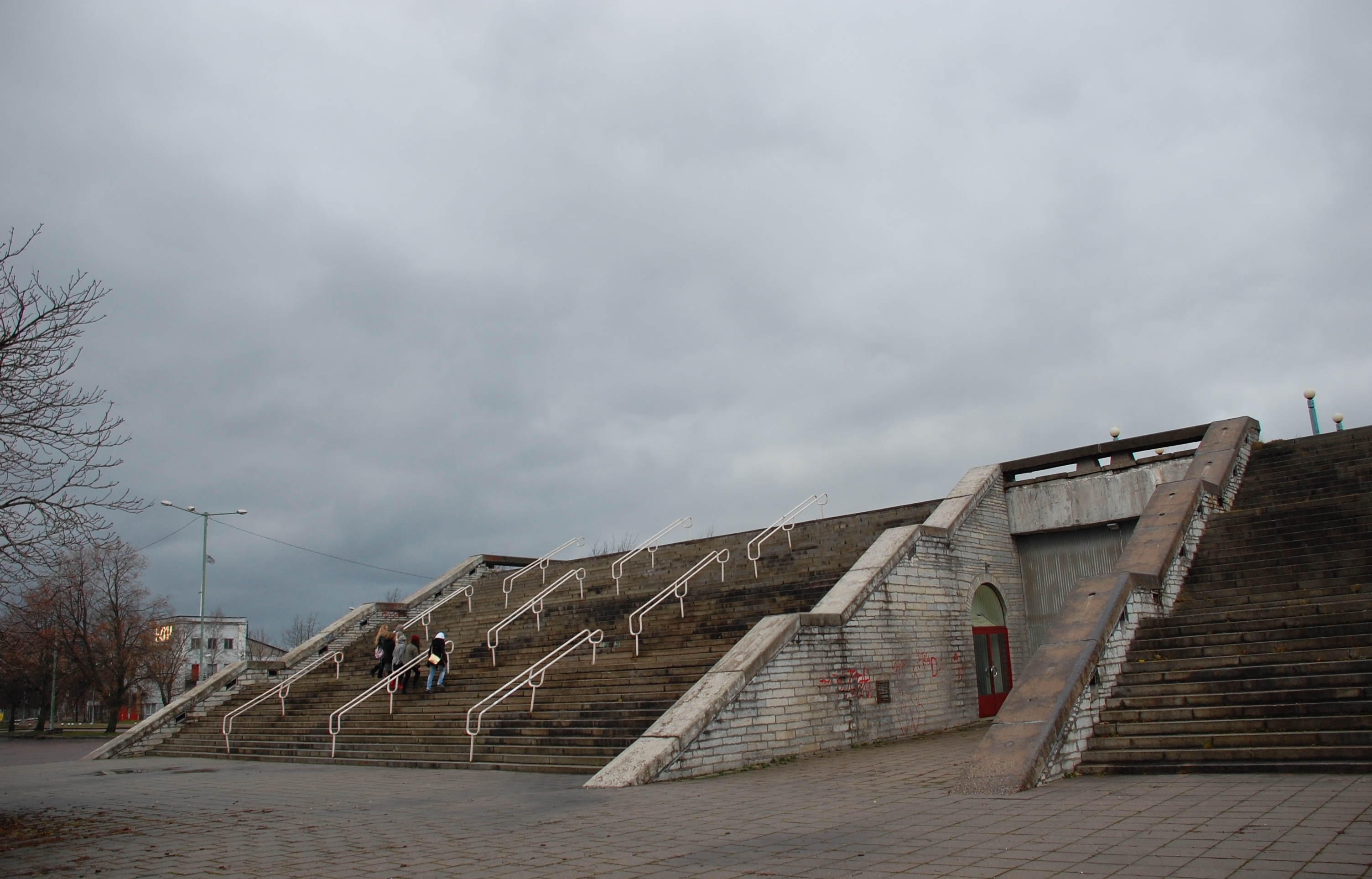 Linnahall